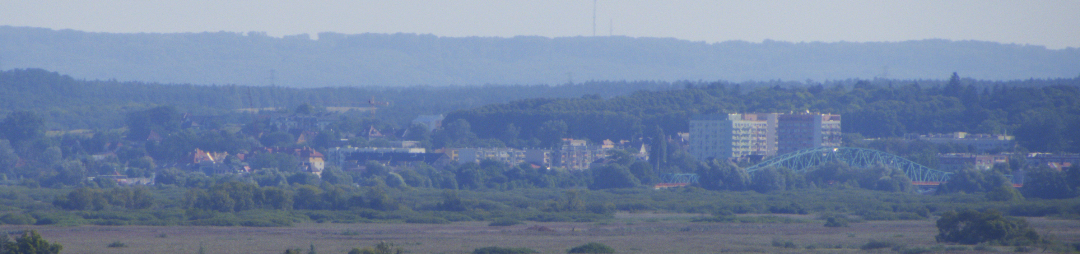 Gryfino von Deutschland aus gesehen